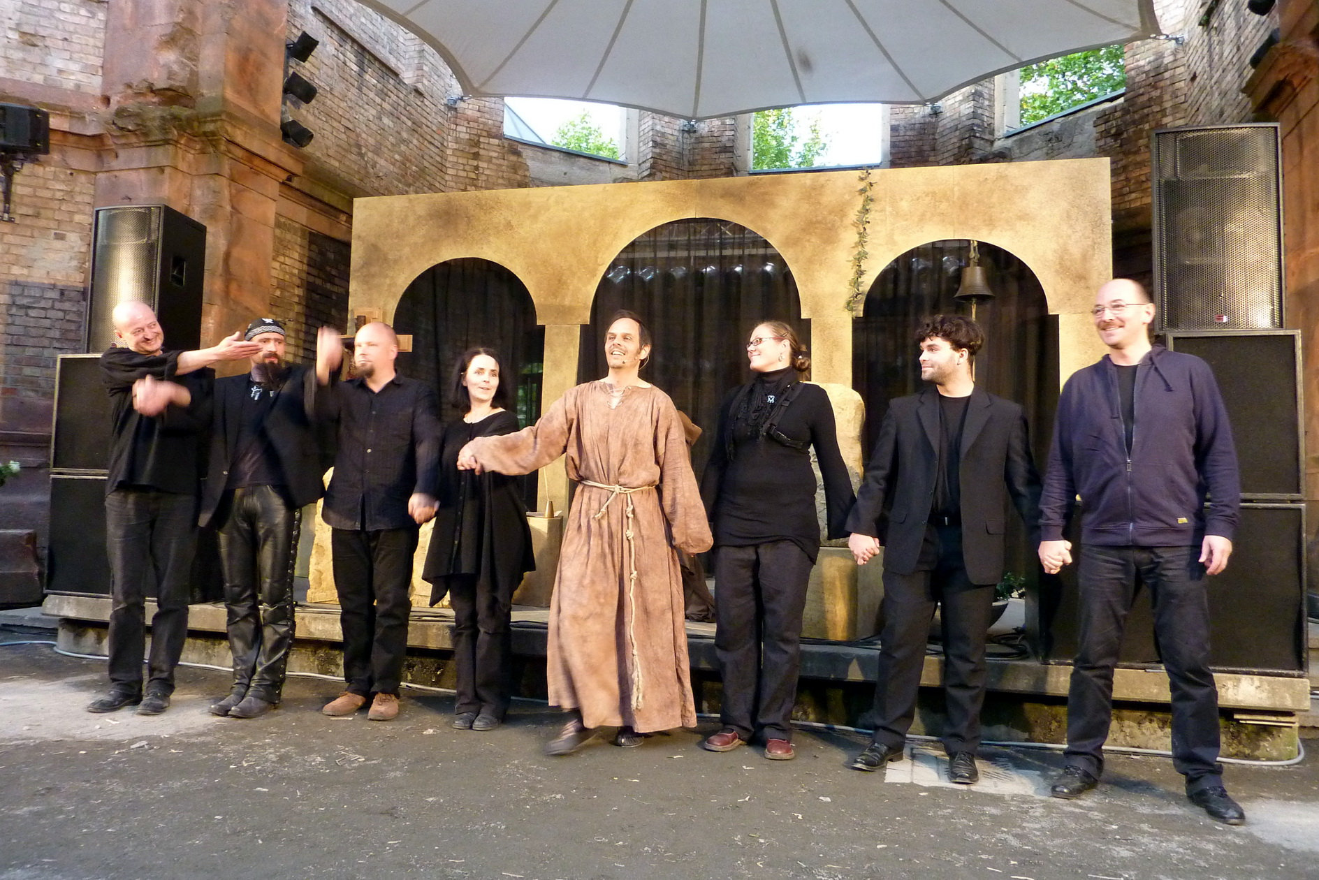 Schlussapplaus Trinitatis Ruine